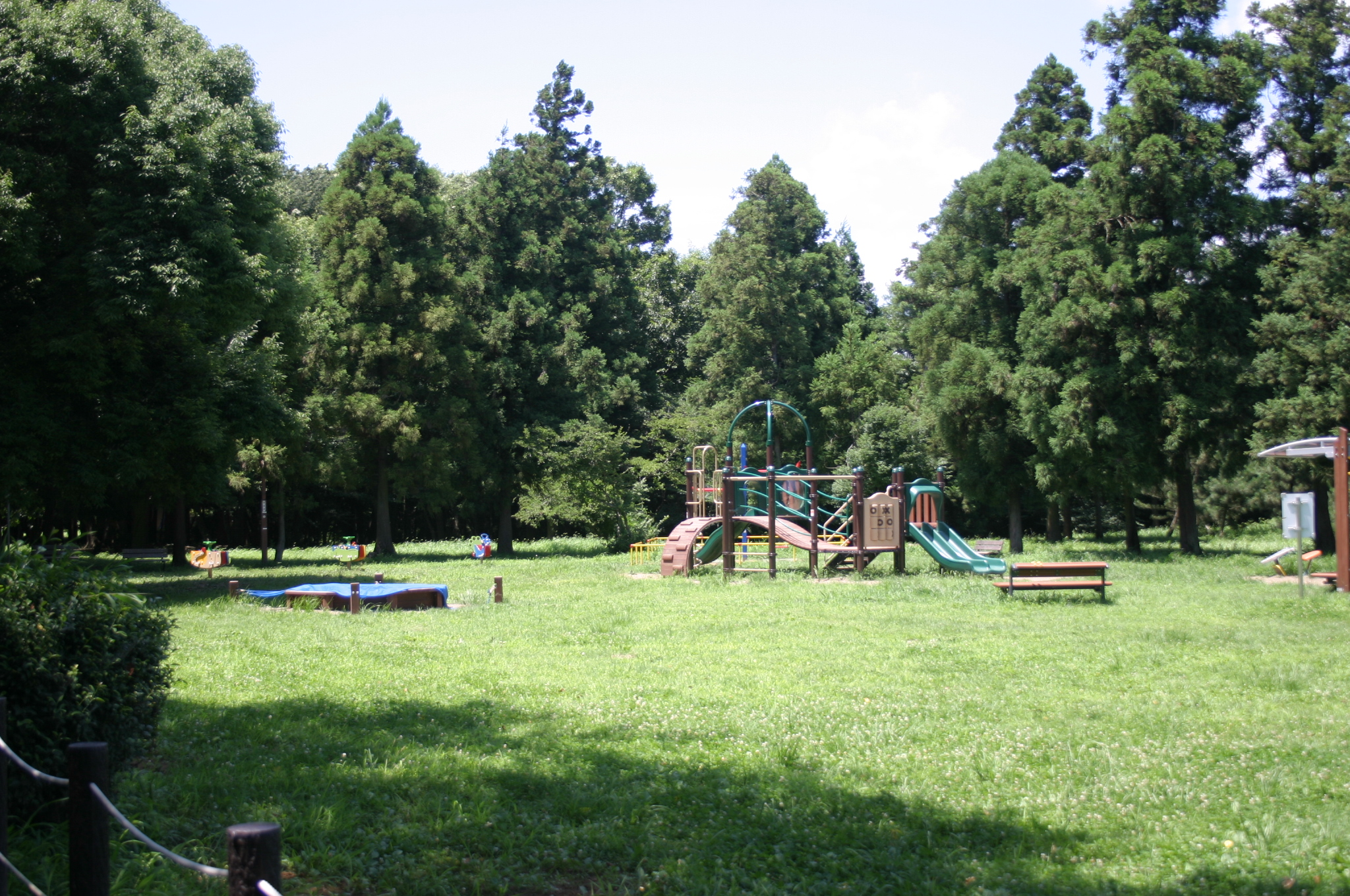 北園森林公園の遊具２